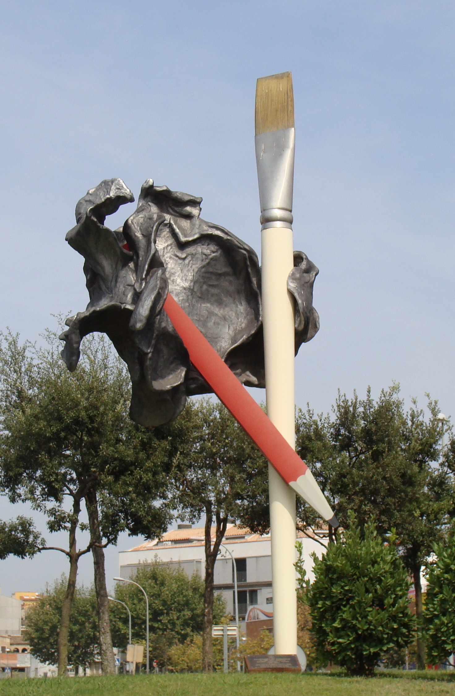 Plaça i escultura a Modest Cuixart, a Palafrugell (Baix Empordà)